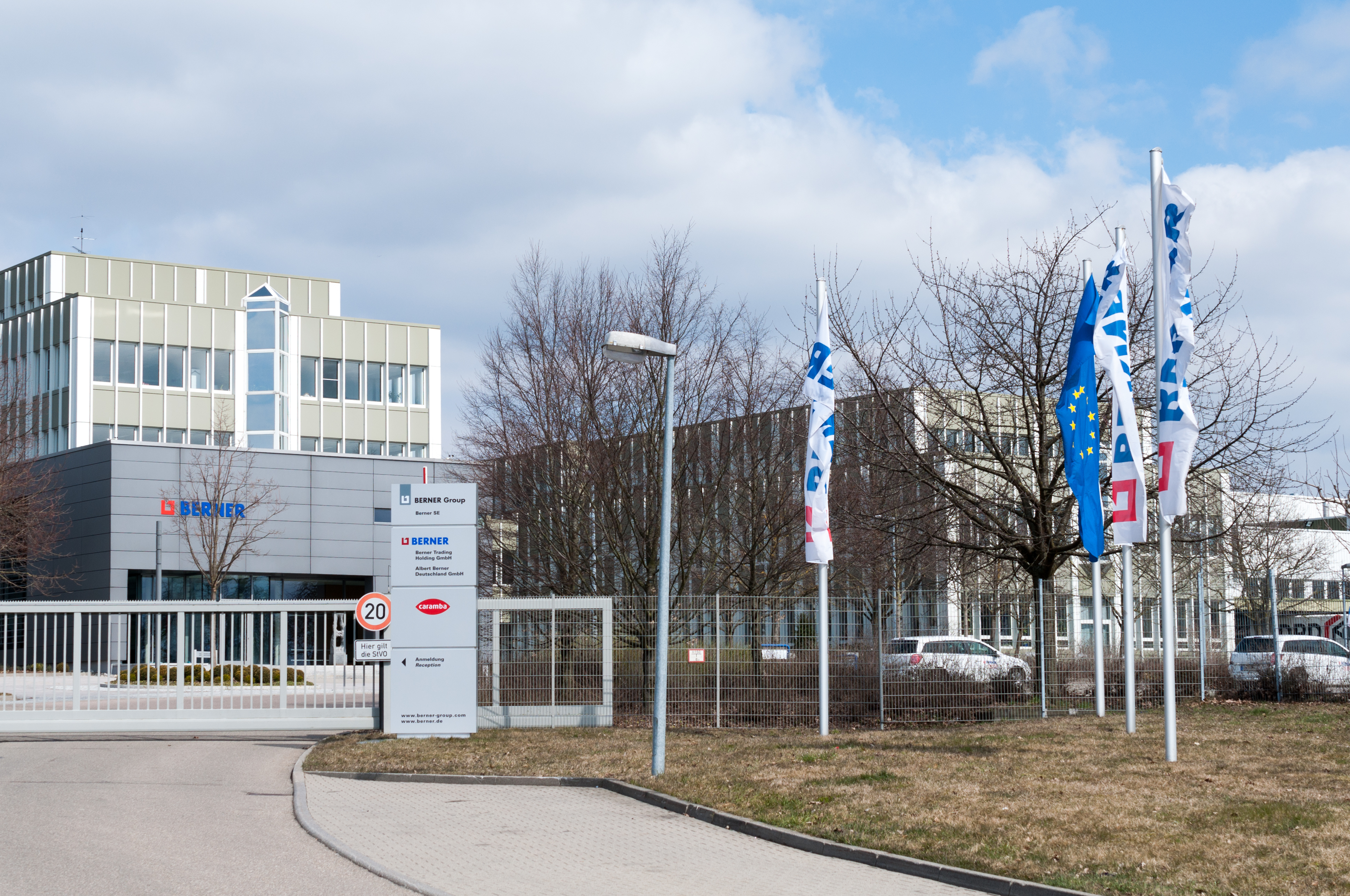 Firmensitz der Berner SE und der Albert Berner Deutschland im Künzelsauer Ortsteil Garnberg.